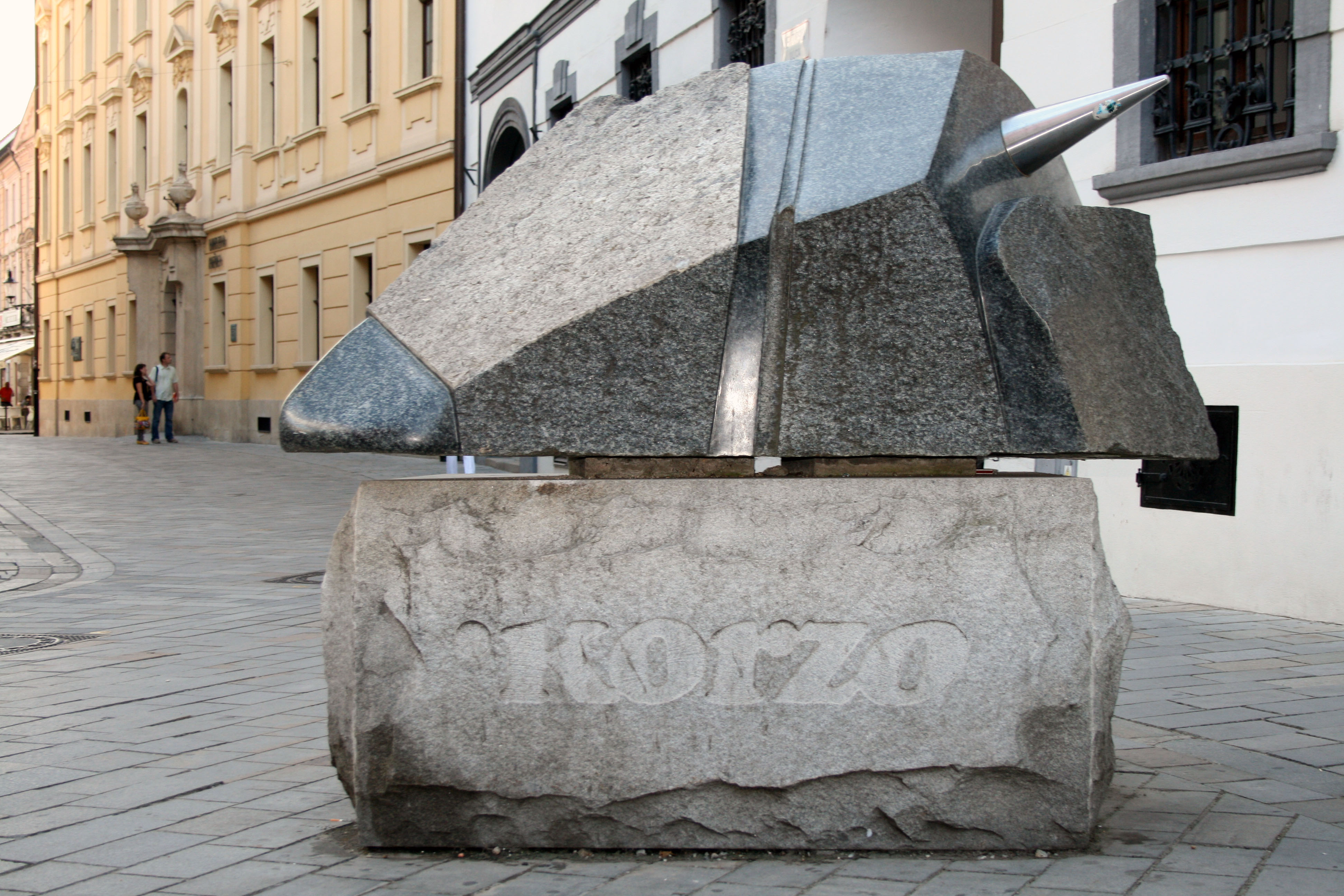 Plastika na Michalskej ulici v Bratislave